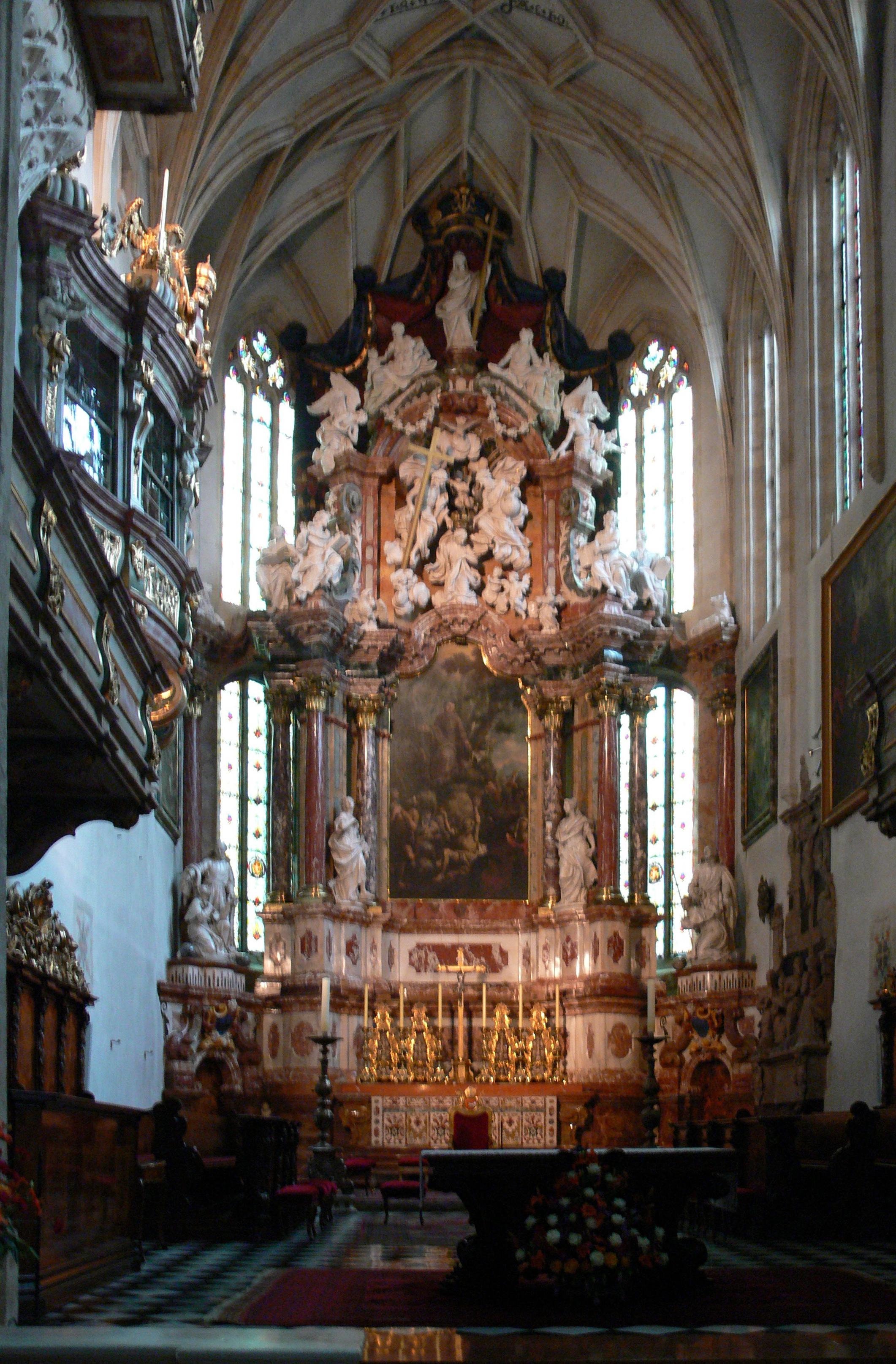 Graz, Dom, Hochaltar